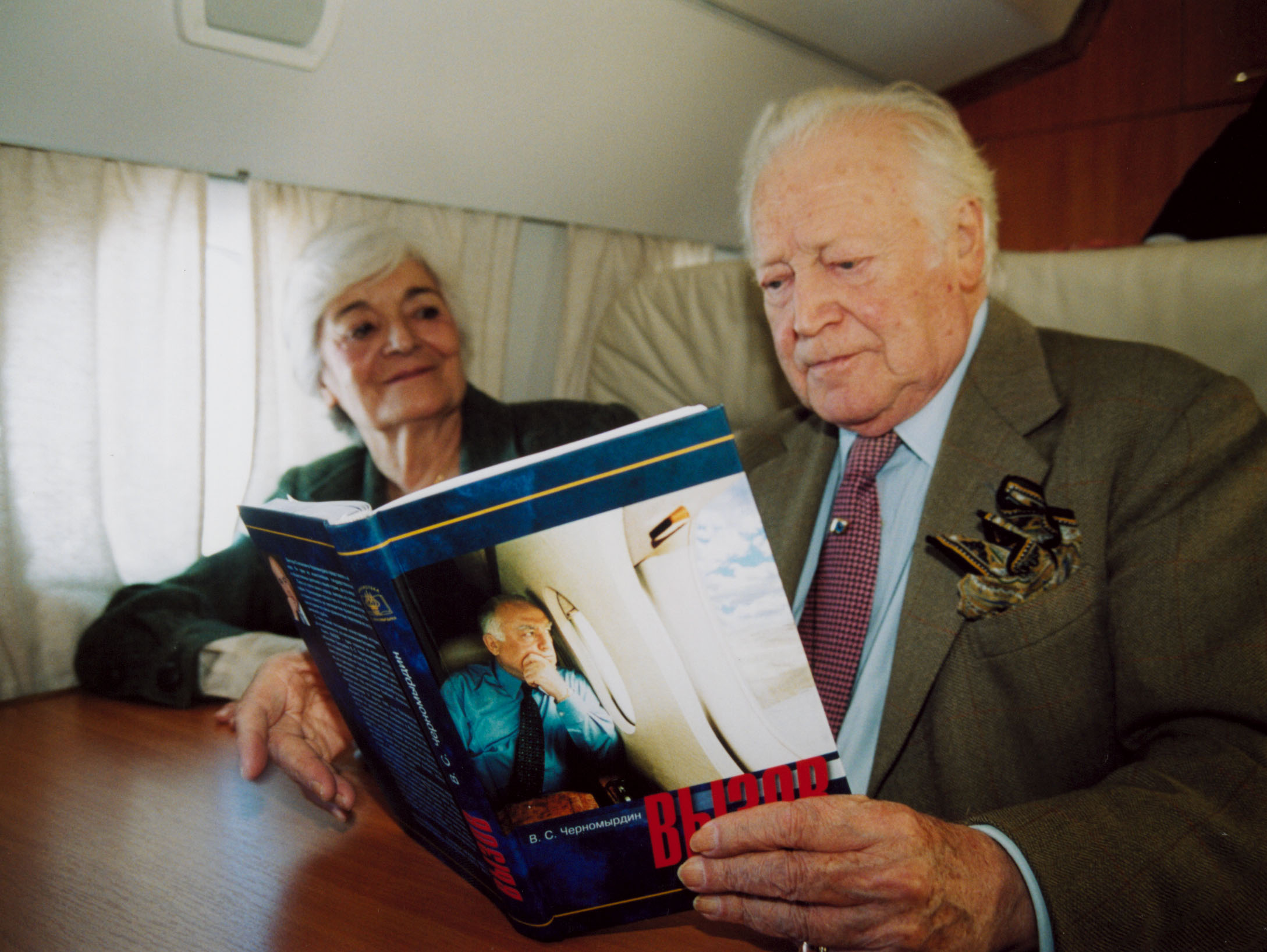 Морис Дрюон с супругой Мадлен читают книгу В. С. Черномырдина "Вызов"в Оренбурге. 2003 год.